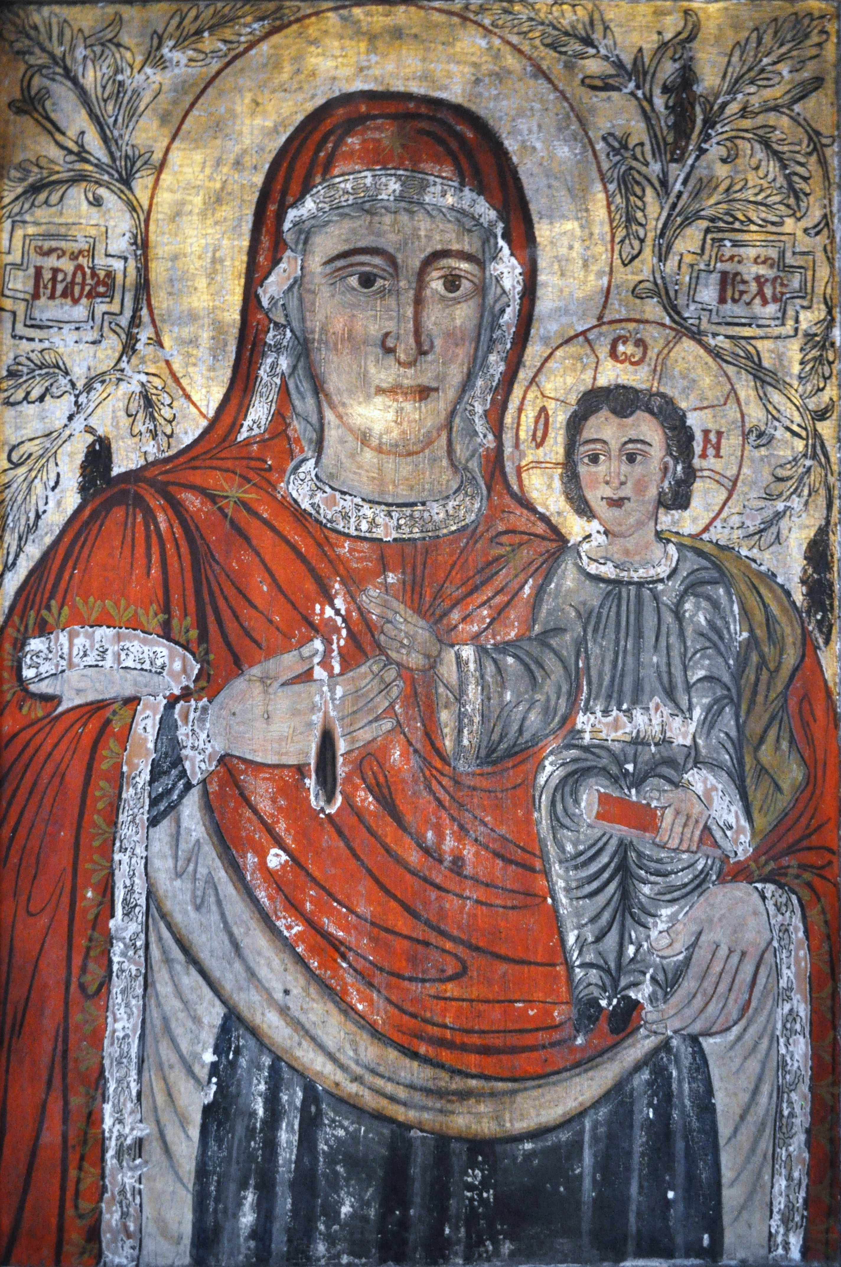 Biserica de lemn „Sfinții Arhangheli” din Runc, județul Alba